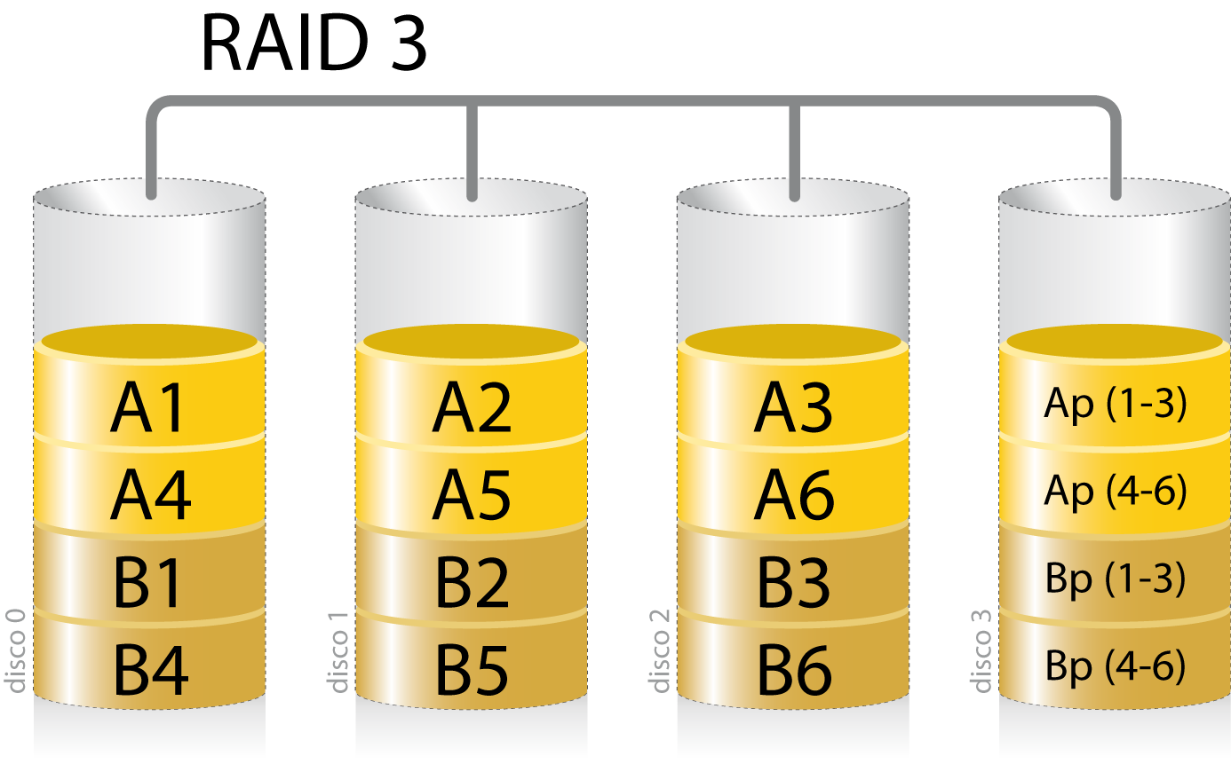 Esquema RAID 3